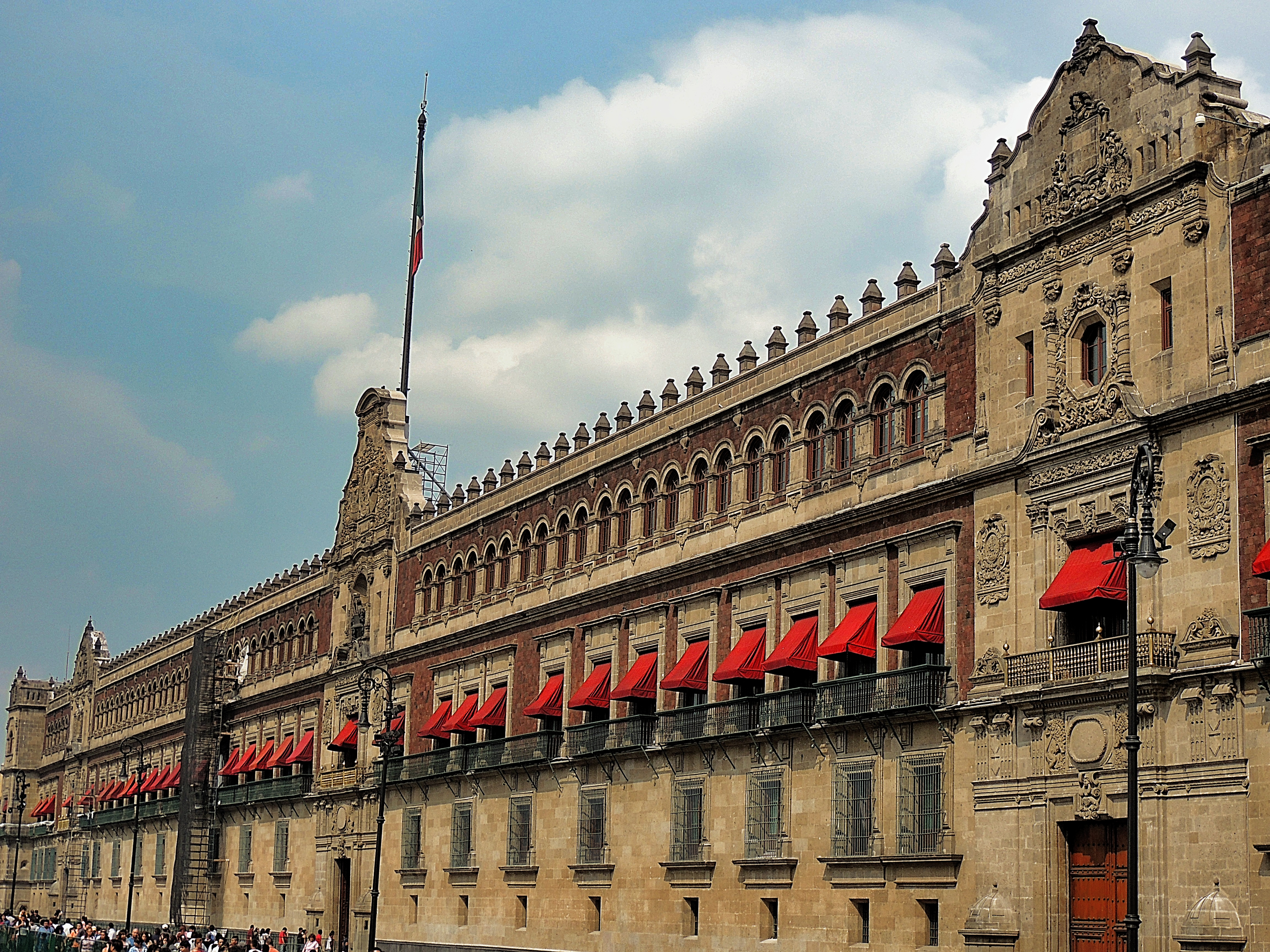 Palacio Nacional